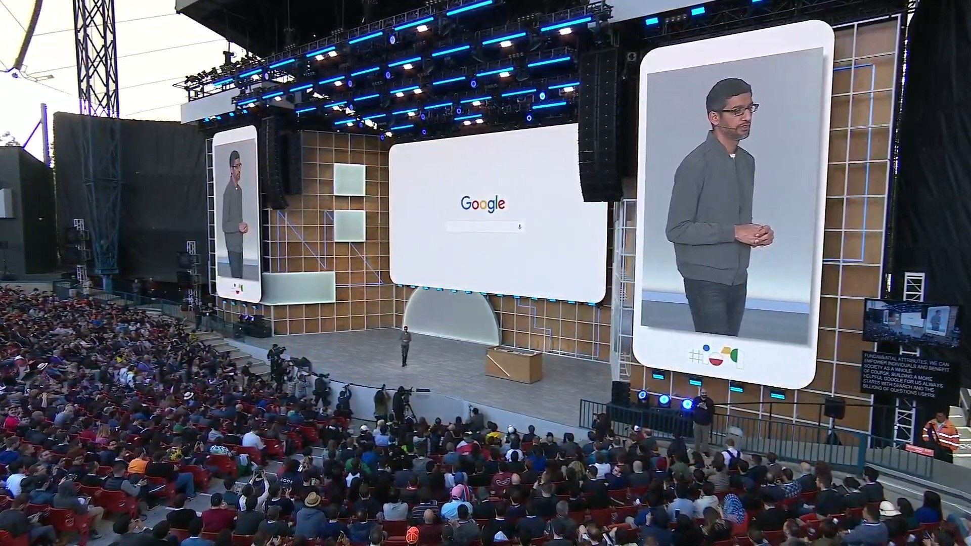 Мероприятие Google